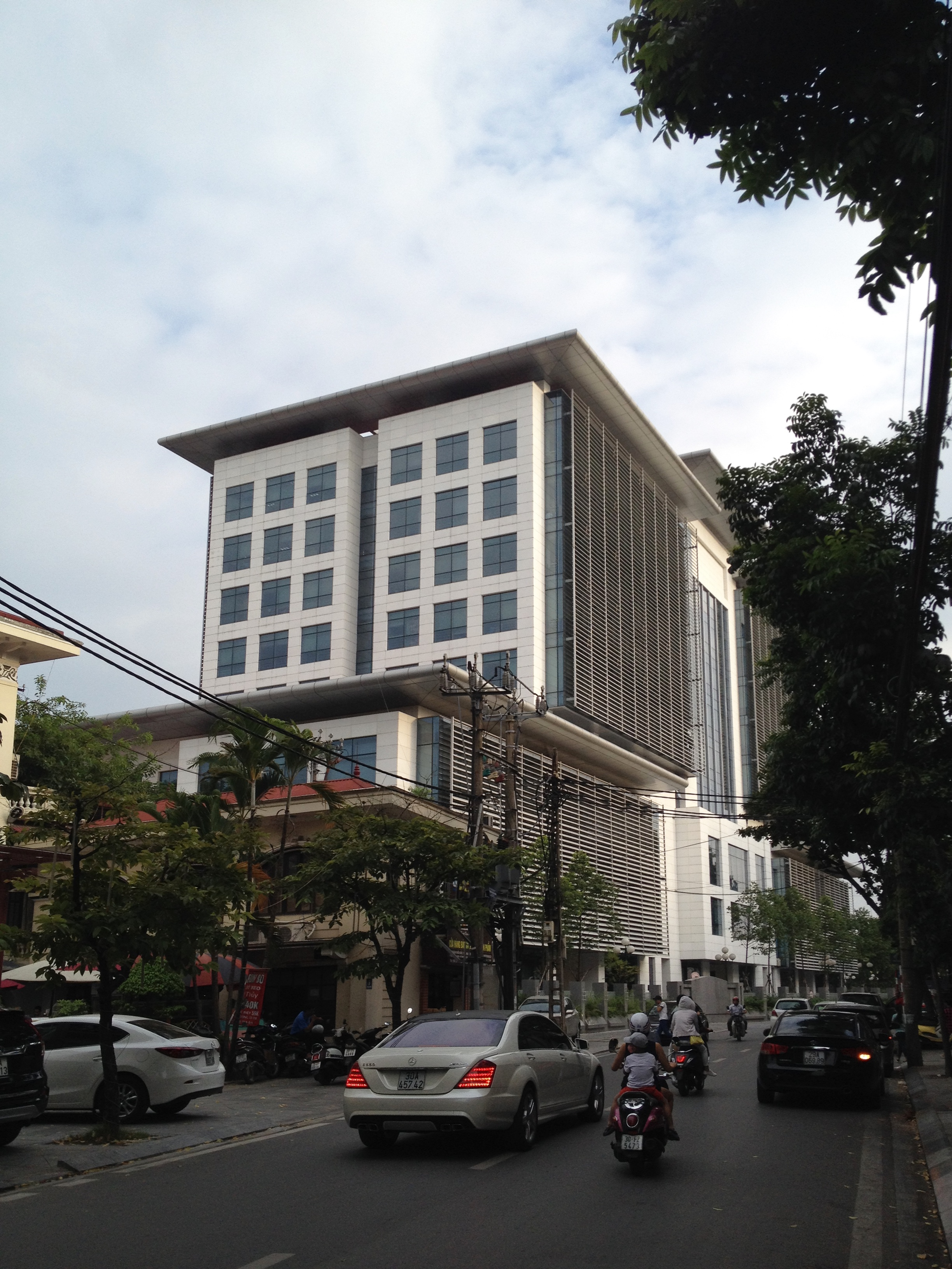 Hà Nội, Việt Nam.